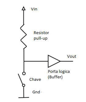 Quando a chave está aberta a tensão de entrada da porta lógica é elevada até se igualar a Vin. Quando a chave está fechada, a tensão de entrada da porta lógica vai para Gnd.